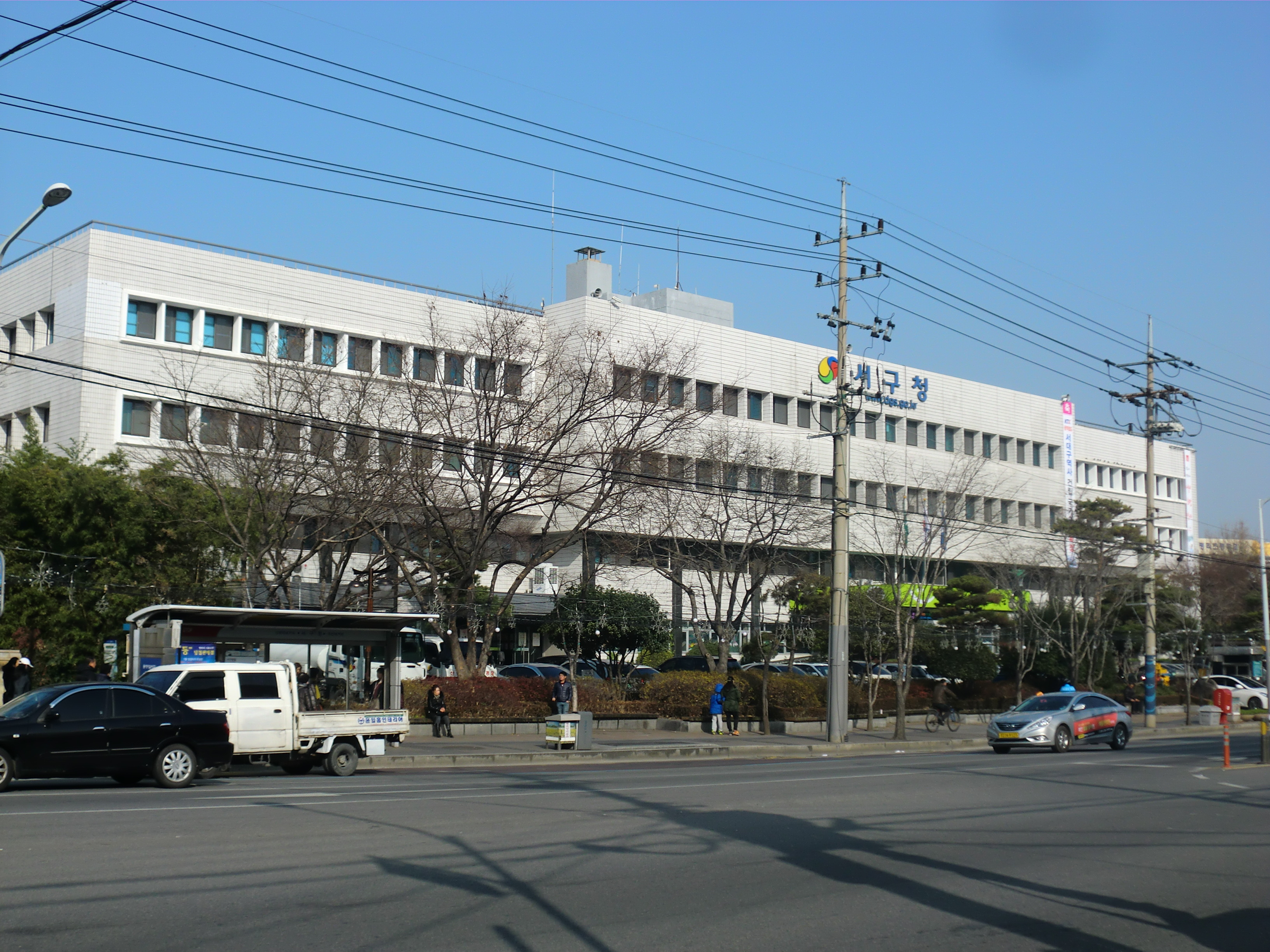 대구광역시 서구에 있는 서구청